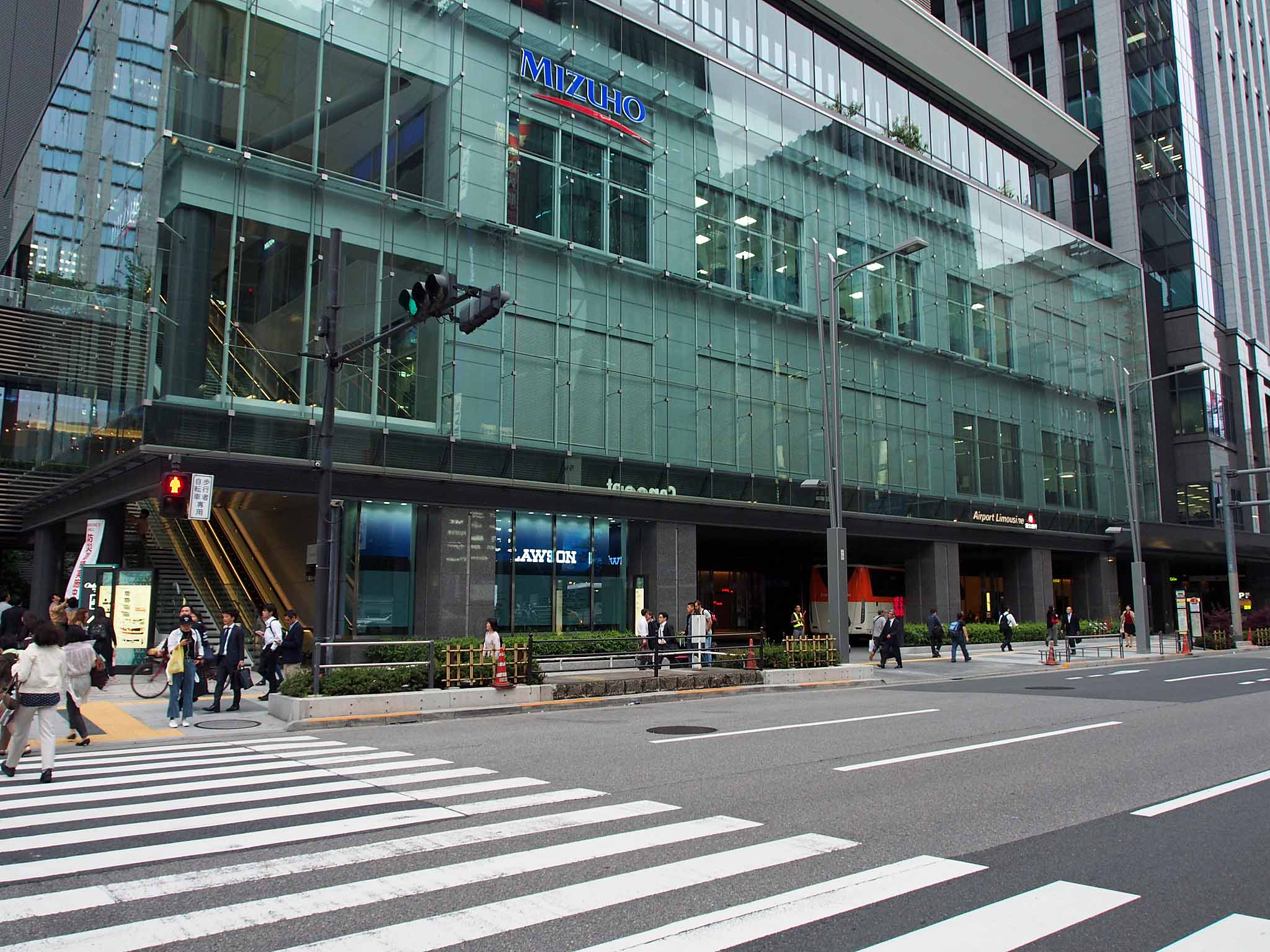 2016年に開設された、鉄鋼ビル南館のバスターミナル。東京空港交通のリムジンバスと富士急行観光の富士五湖行き高速バスが発着する。